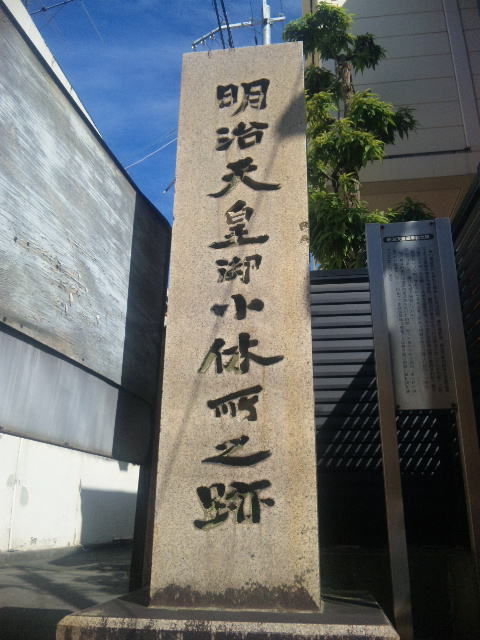 大和高田市の本郷通り商店街にある明治天皇巡幸記念碑。明治10年2月12日巡幸、昭和12年建立、揮毫は徳富蘇峰。